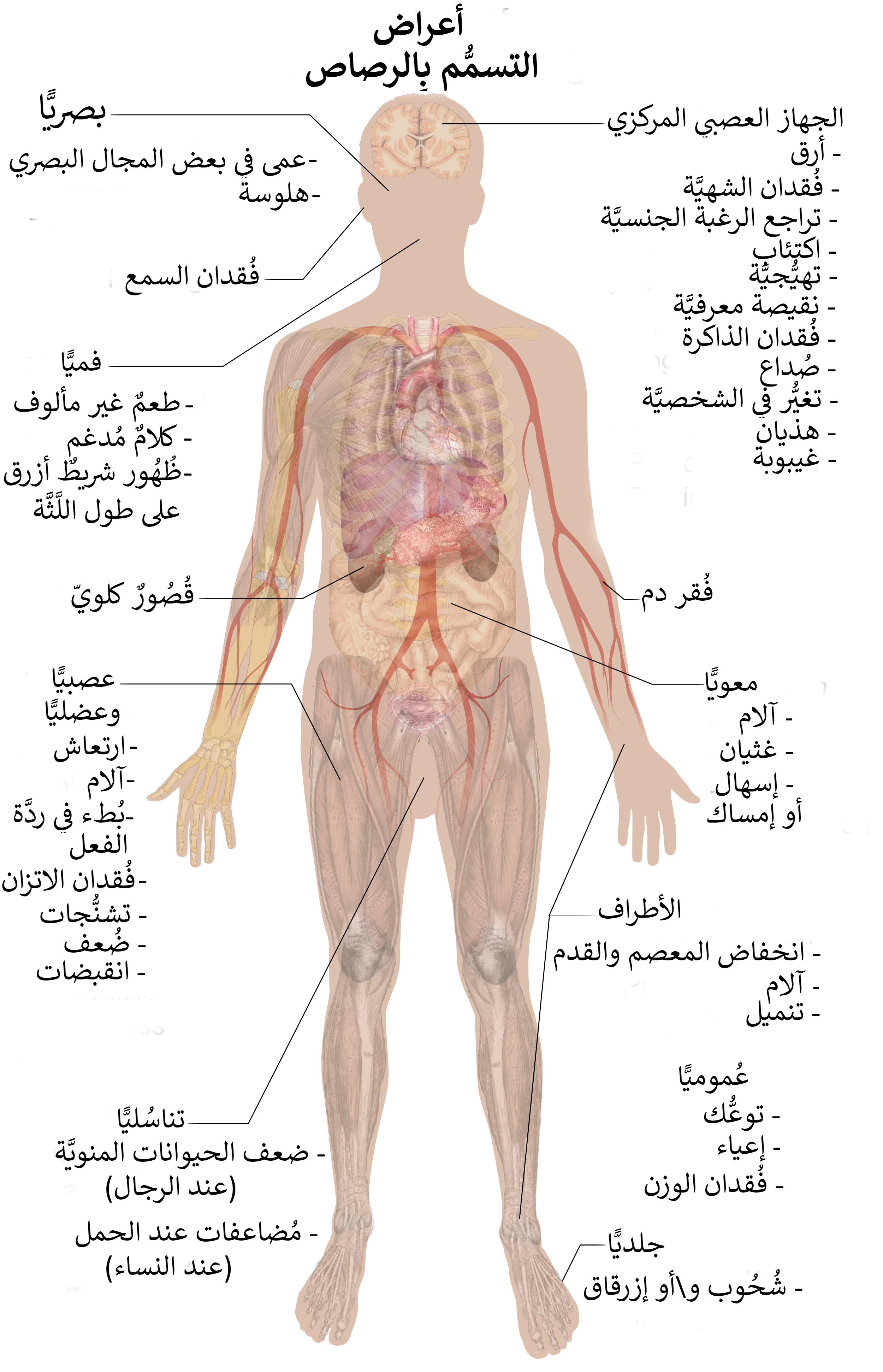 رسمٌ بيانيٌ يُوضح أعراض التسمُم بِالرصاص.